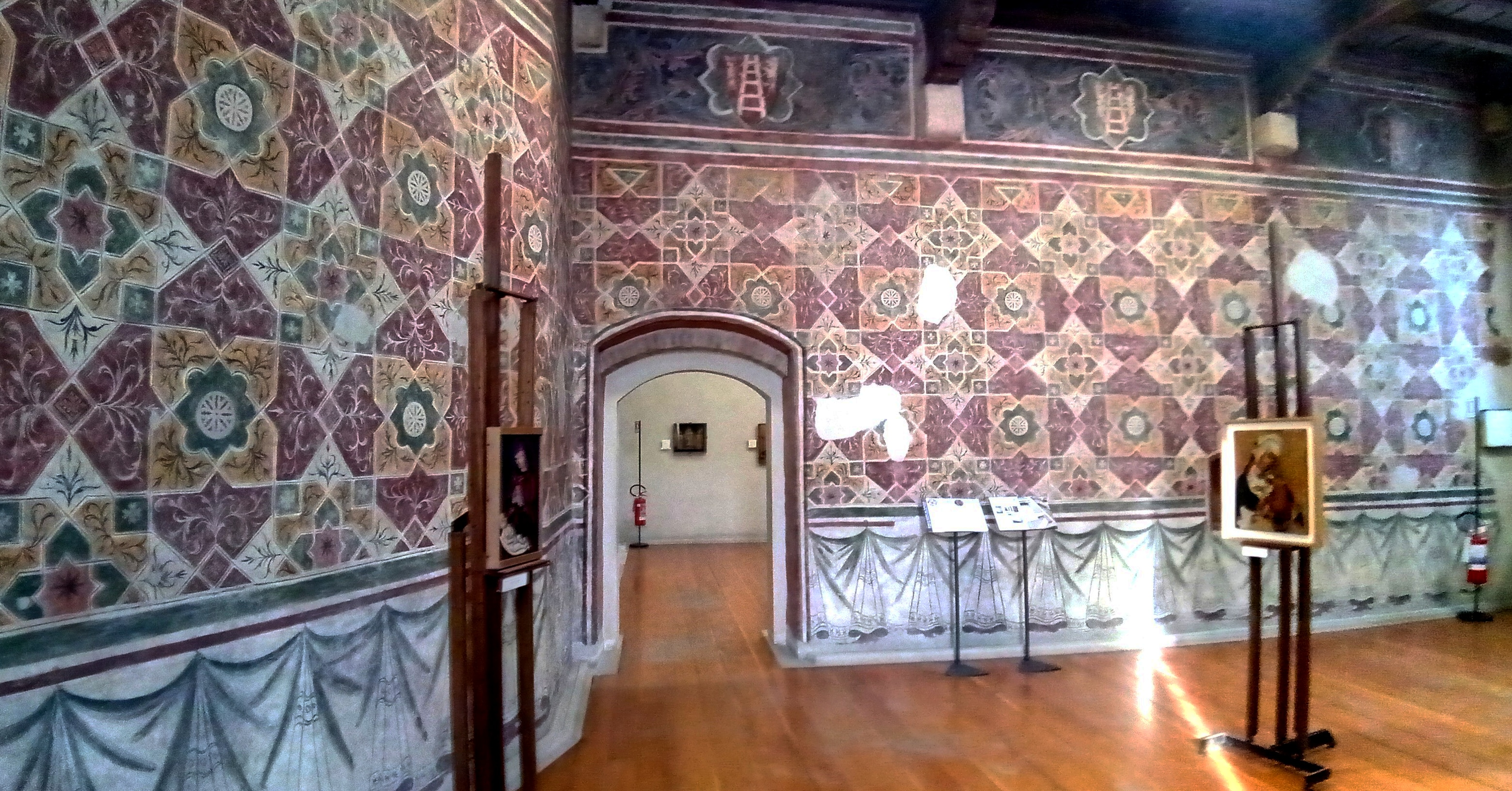 Interni museo castelvecchio